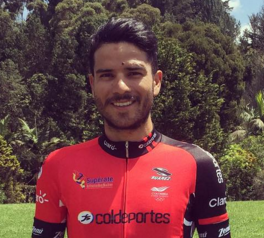 Carlos Julián Quintero dans le maillot de sa nouvelle formation Coldeportes-Claro